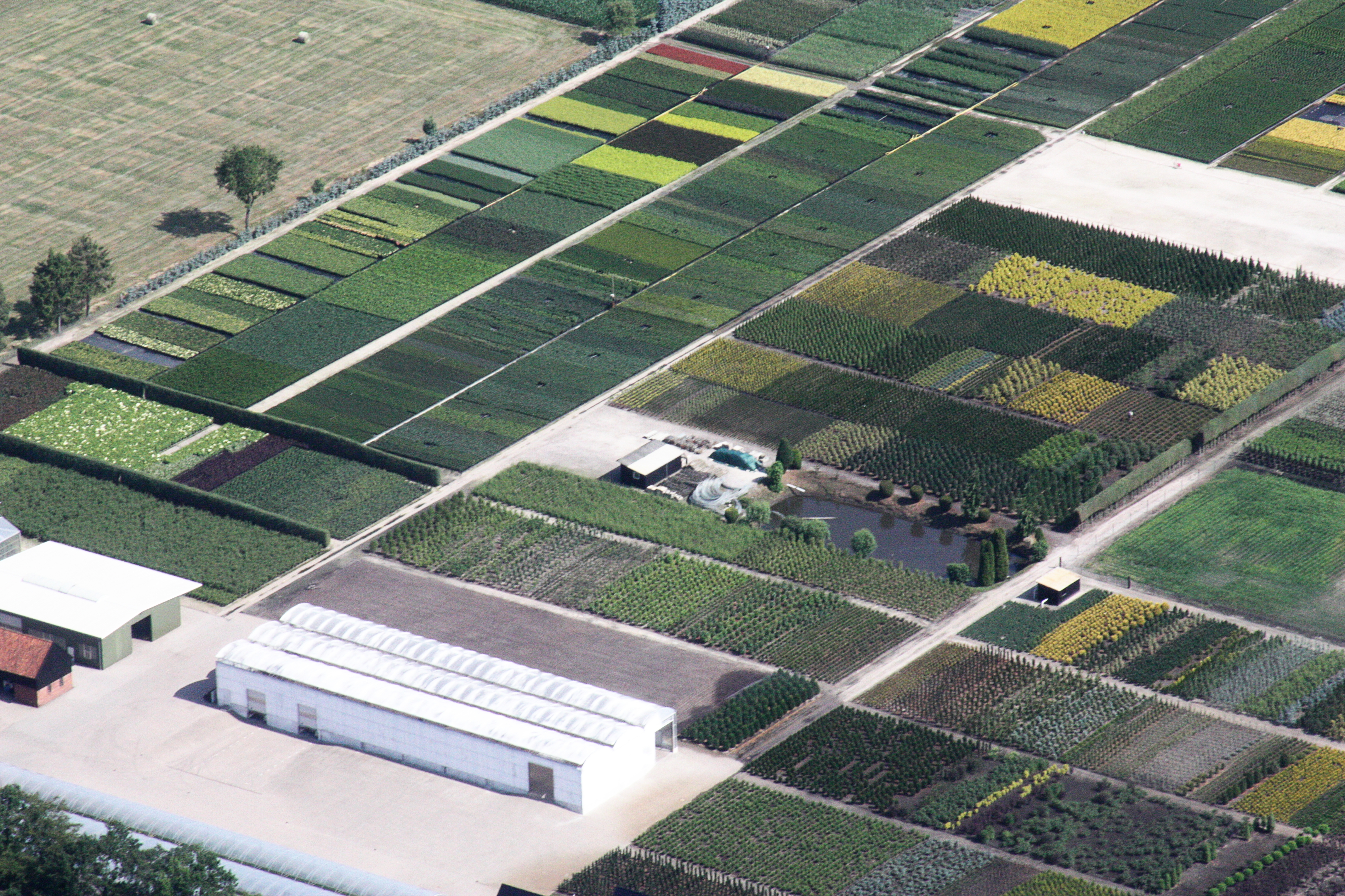 Flug von Oldenburg (Oldenburg) nach Bad Zwischenahn und zur Landesgartenschau ; Flughöhe 1500 ft; Juli 2010; Originalfoto bearbeitet: Tonwertkorrektur und Bild geschärft mit Hochpassfilter